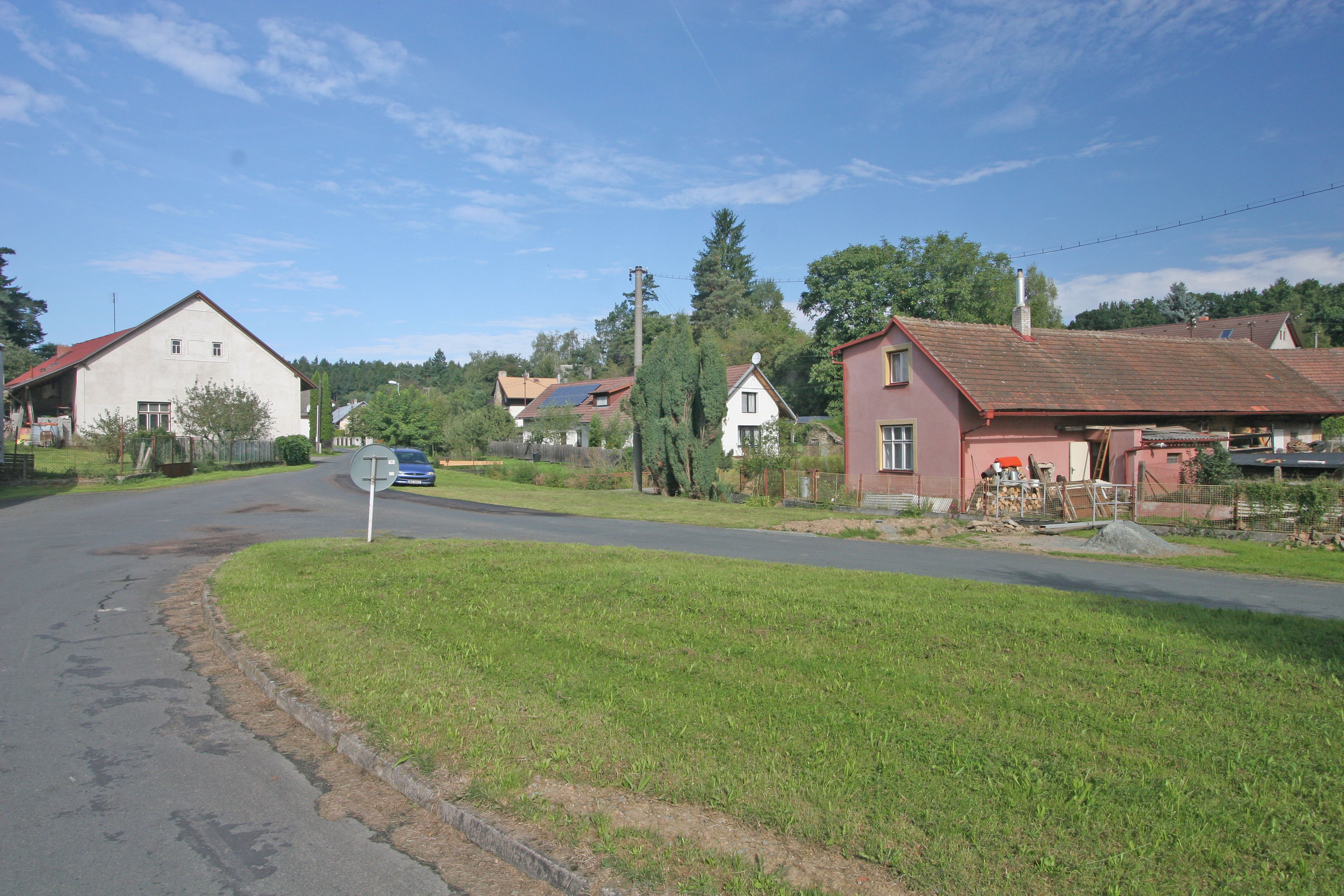 Ledec čp. 11